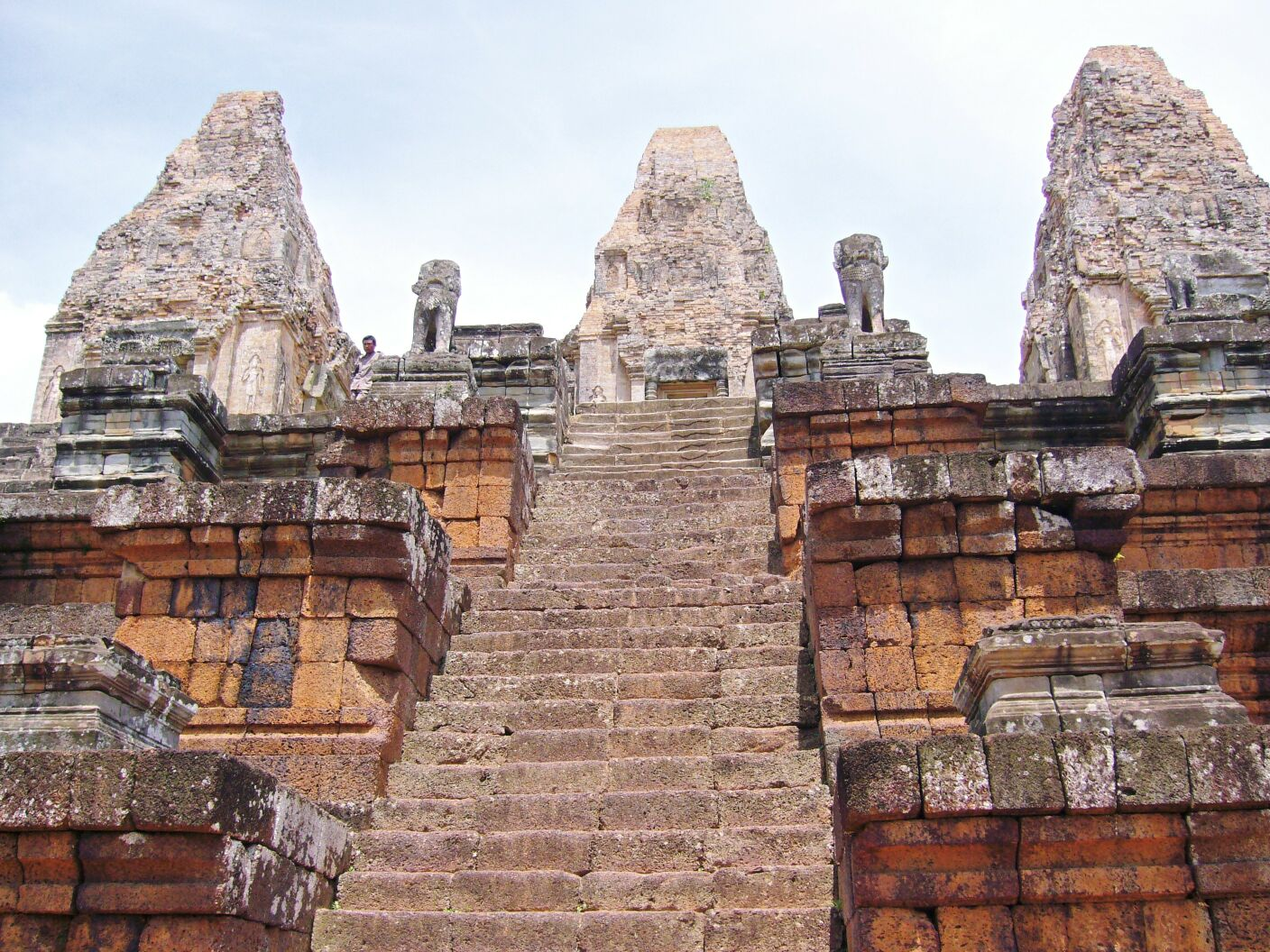 平成18年5月、投稿者撮影、プレループの基段